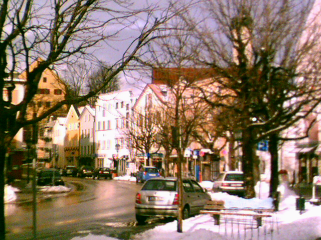 Bad Aibling: Kirchzeile (XII-2005)